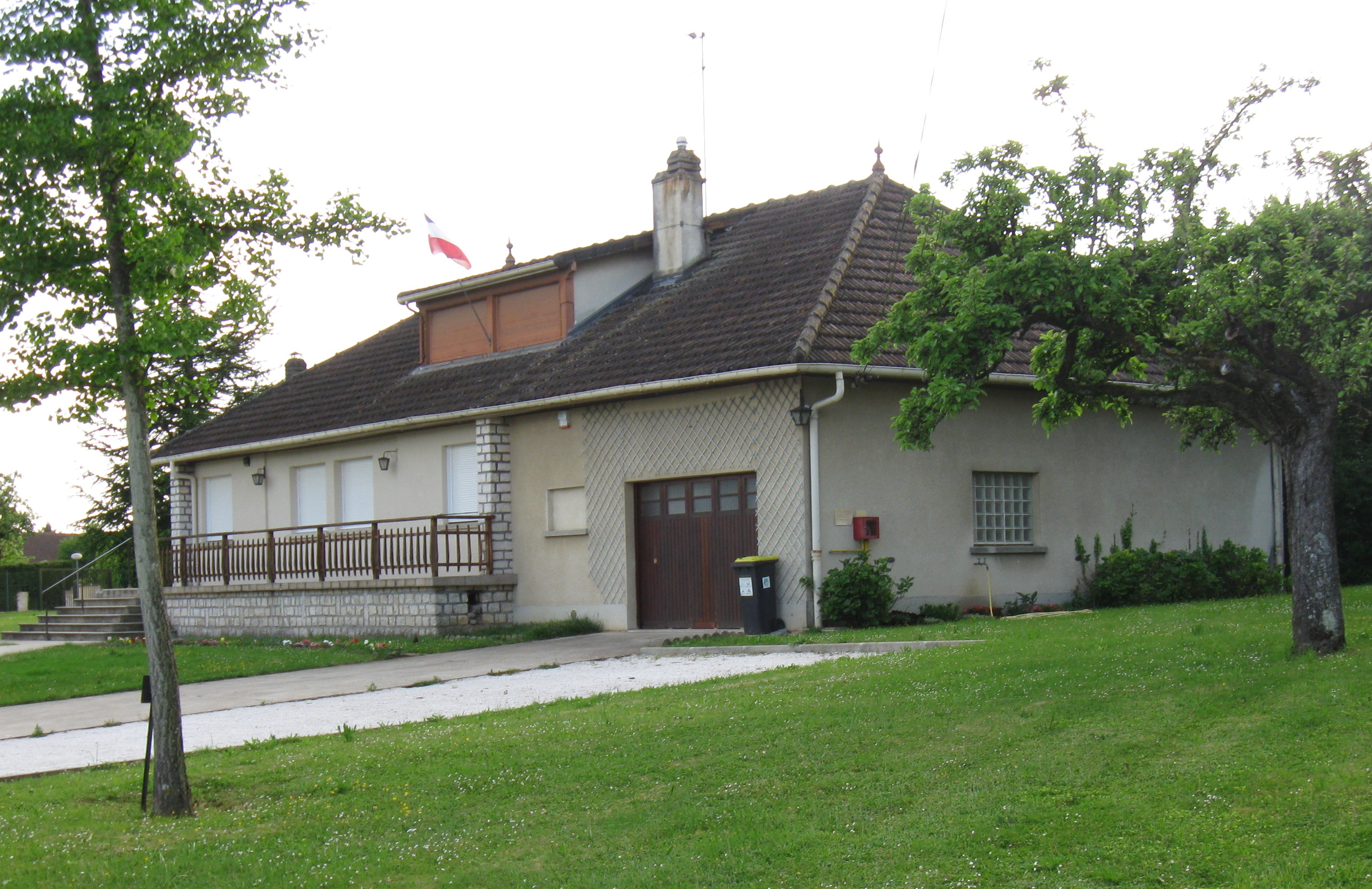 Mairie de Gouaix. (Seine-et-Marne, région Île-de-France).